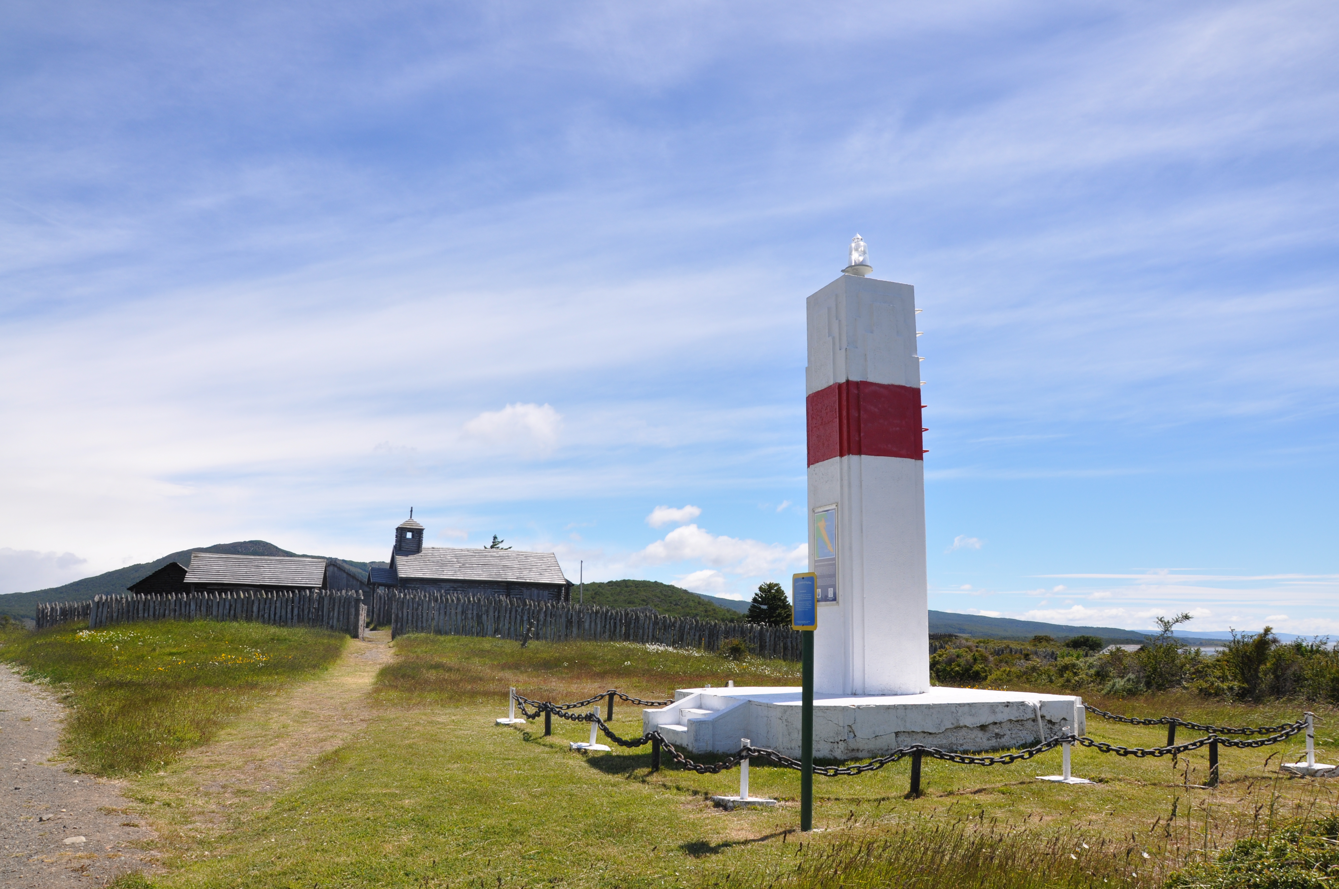 Phare Punta Santa Ana, Fuerte Bulnes, Chili